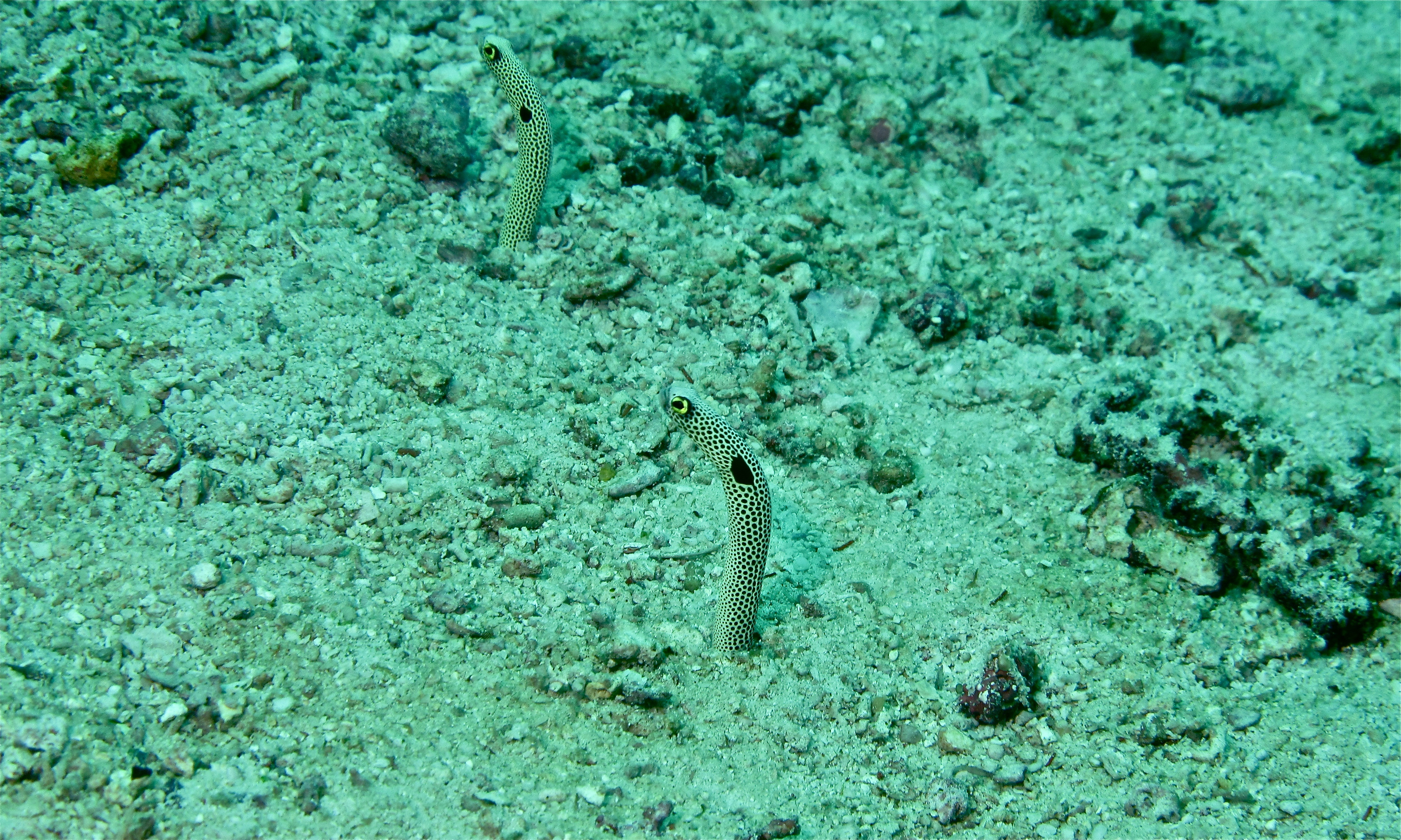 Barracuda Point, Pulau Sipadan, Sabah, MALAYSIA